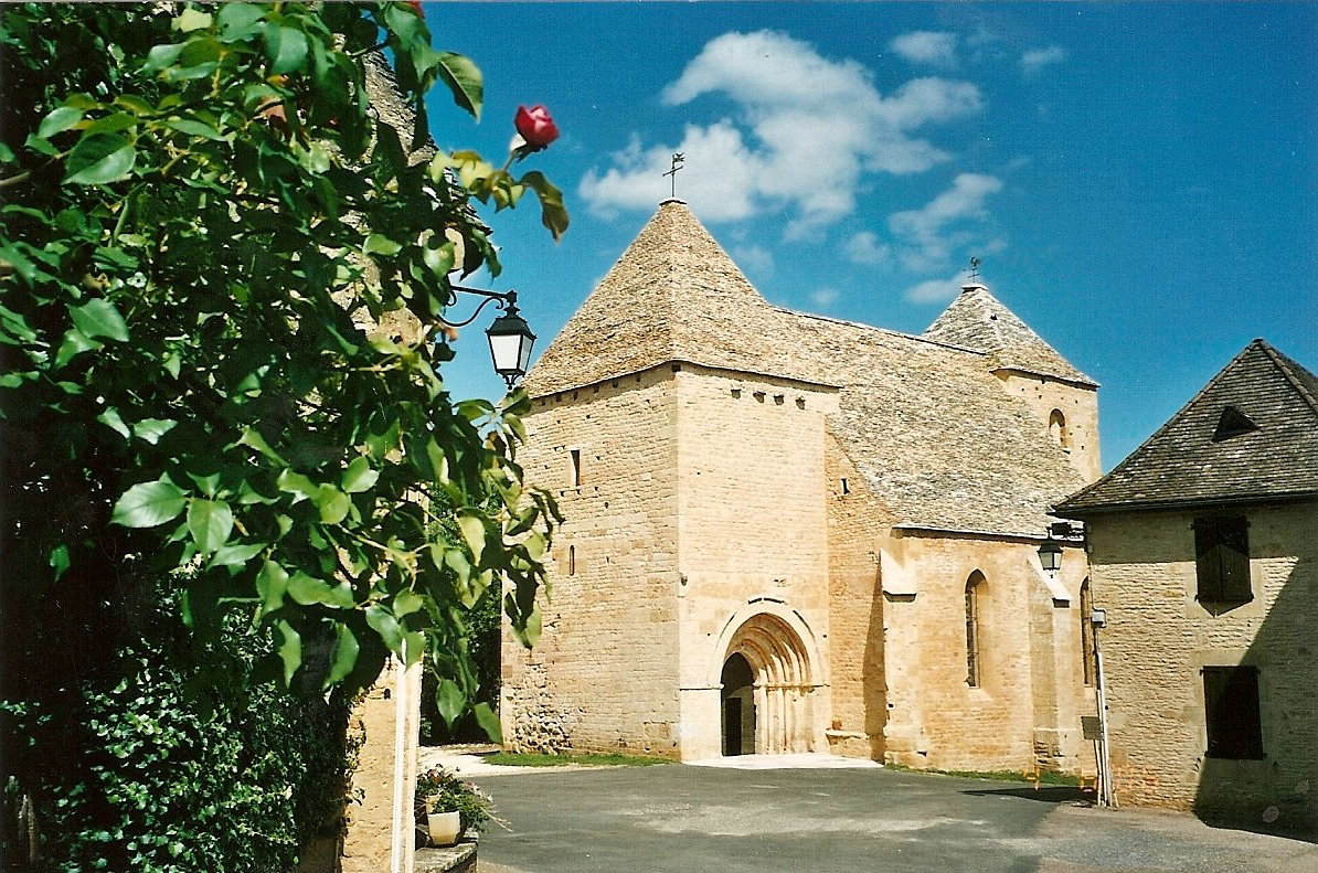 Eglise d'Archignac